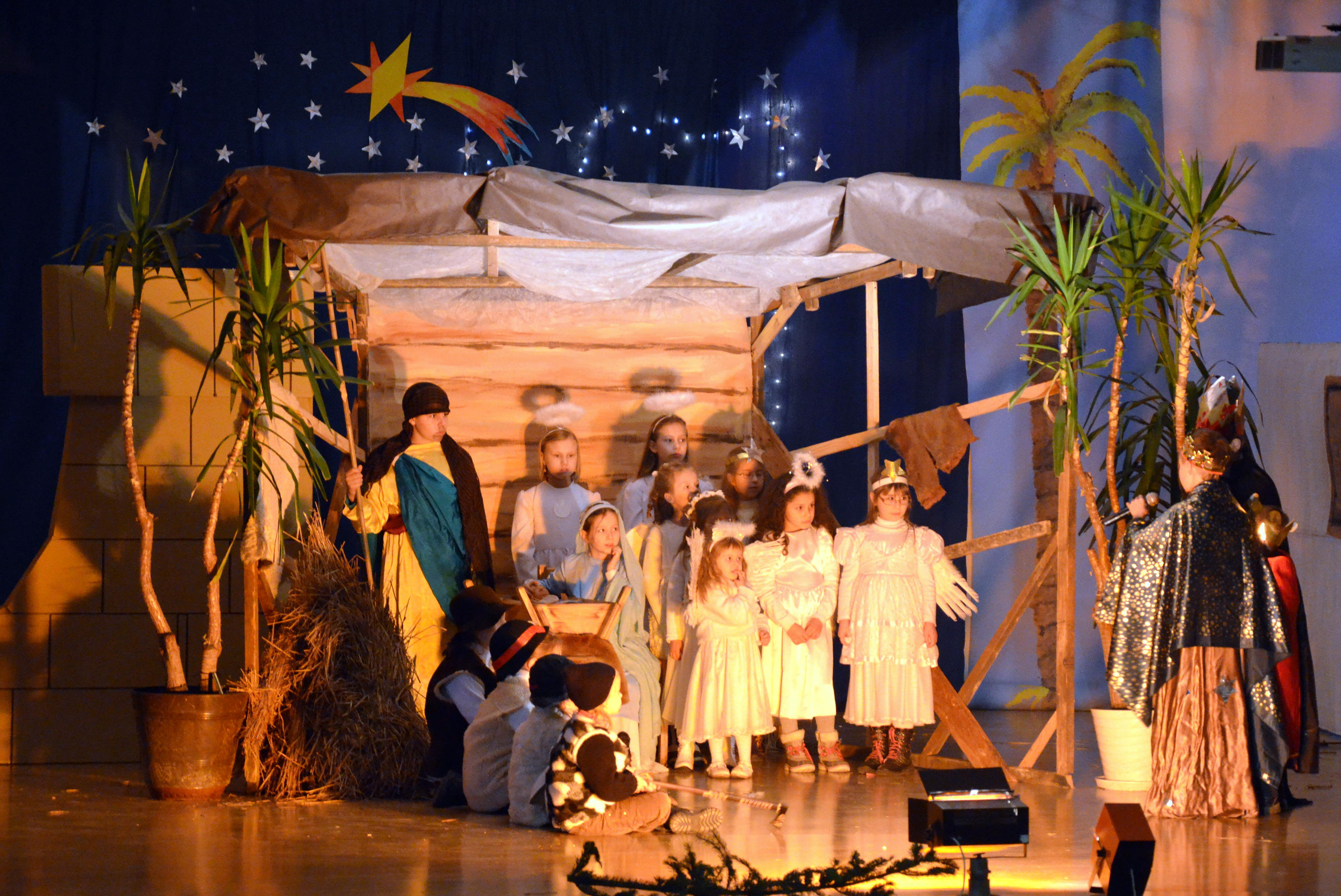 Krippenspiel in Sanok